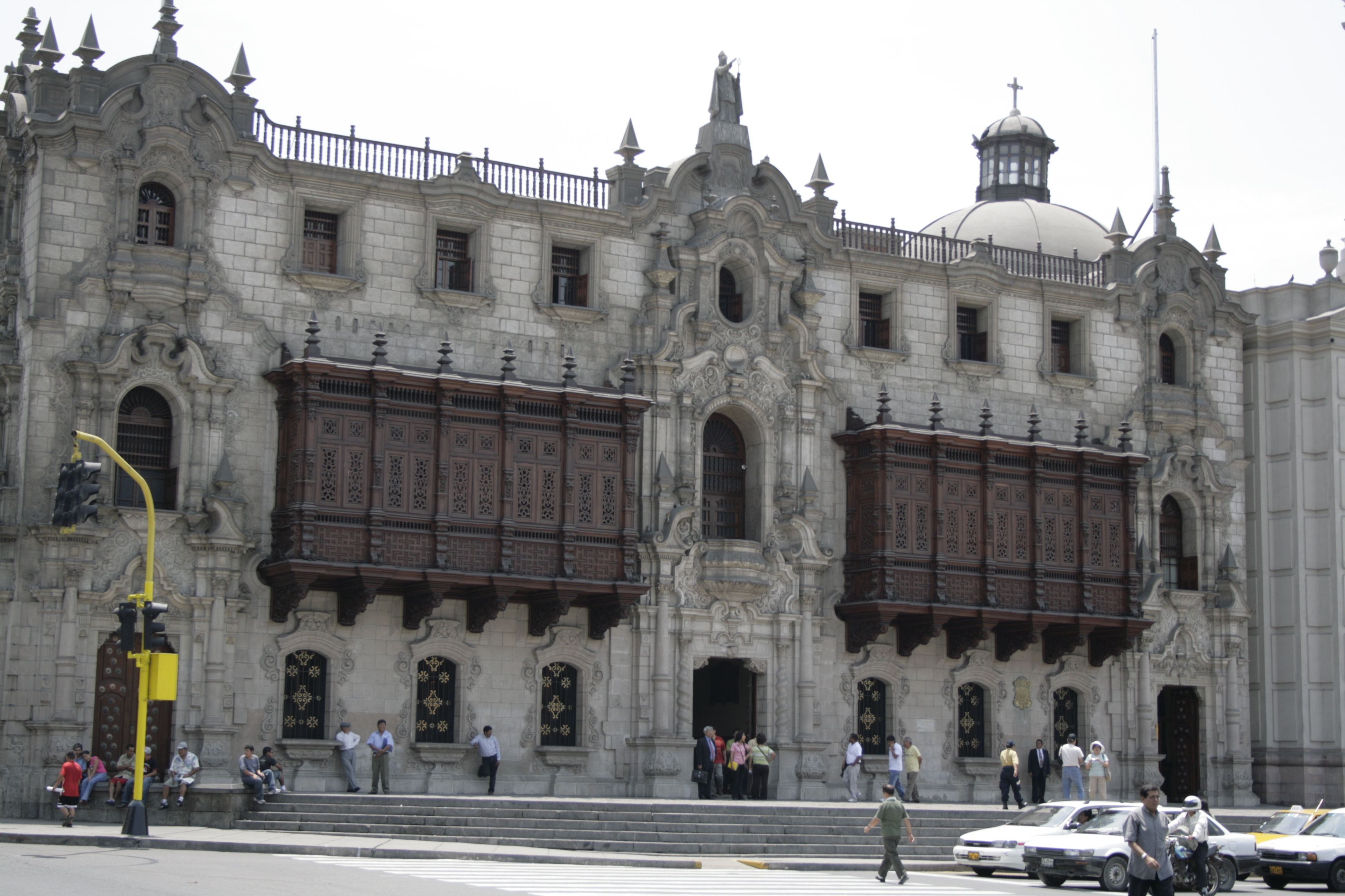 Palacio Arzobispal de Lima